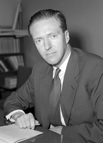 portrett, mann, overlege i Helsedirektoratet, sittende halvfigur ved skrivebord. Rigmor Dahl Delphin (1908-1993) var ansatt som fotograf i ukebladet Alle Kvinner. Hennes negativarkiv ble i 2005 overført Oslo Bymuseum fra Gyldendal Norsk Forlag som var utgiver av bladet.